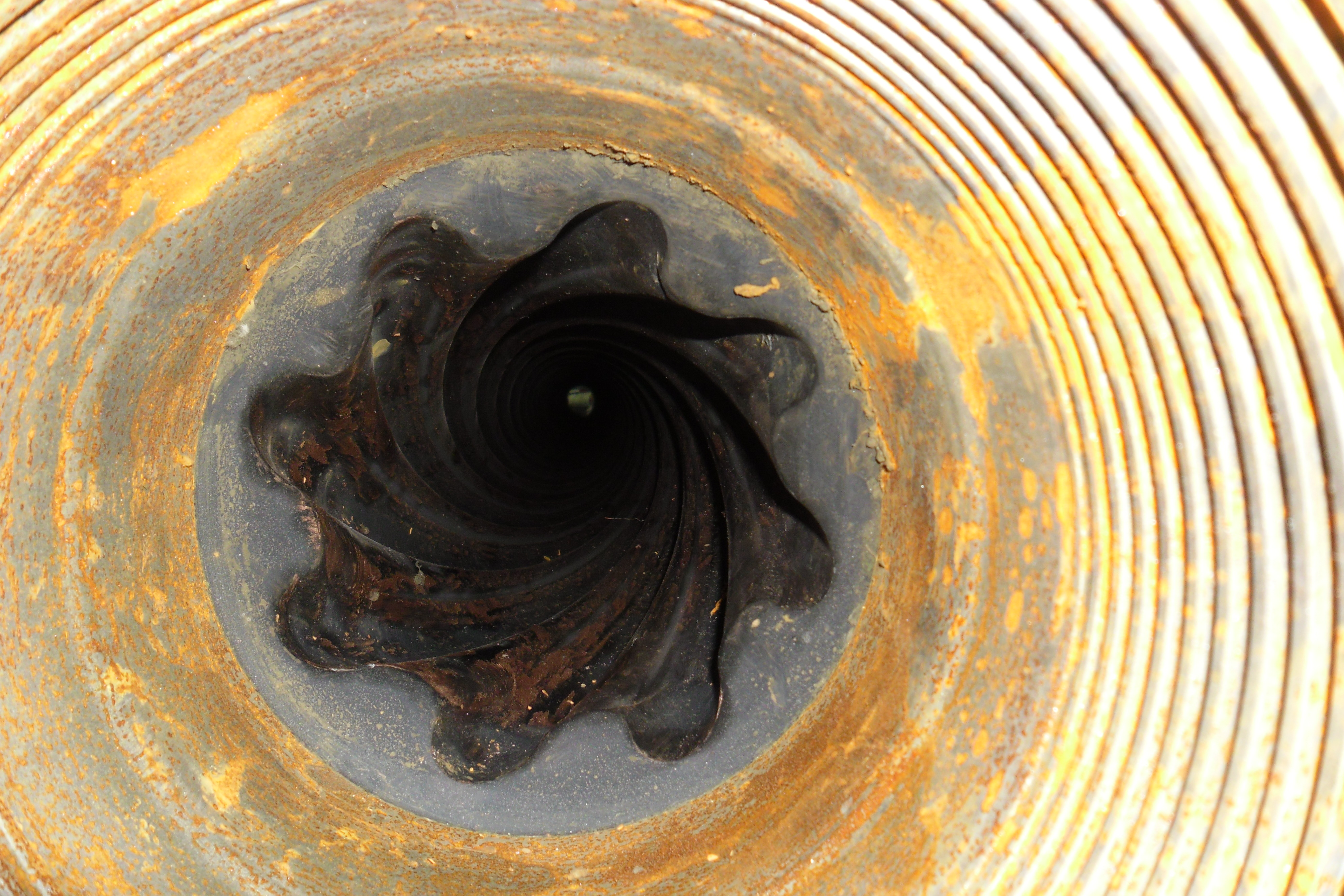 Фото